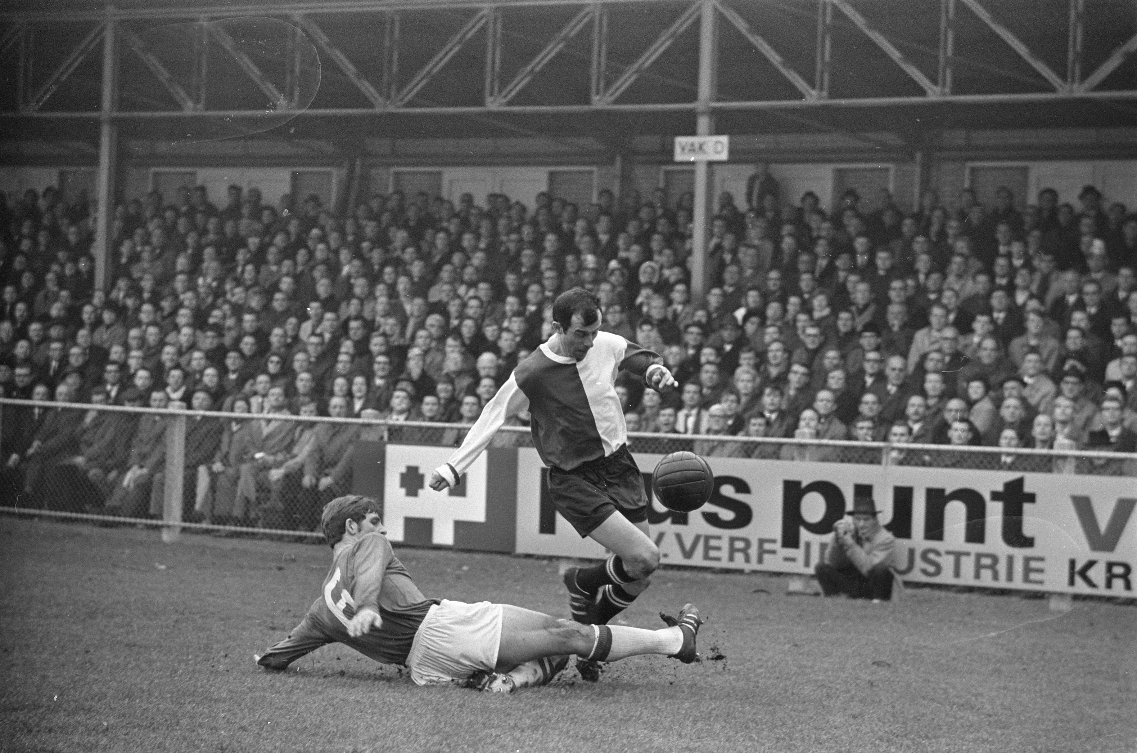 Collectie / Archief : Fotocollectie Anefo Reportage / Serie : [ onbekend ] Beschrijving : AZ 67 tegen Feijenoord 1-1 Coen Moulijn omspeelt Twisk (liggend) Datum : 26 januari 1969 Locatie : Alkmaar Trefwoorden : sport, voetbal Persoonsnaam : Moulijn, Coen, Twisk, Dick Instellingsnaam : Feyenoord Fotograaf : Verhoeff, Bert / Anefo Auteursrechthebbende : Nationaal Archief Materiaalsoort : Negatief (zwart/wit) Nummer archiefinventaris : bekijk toegang 2.24.01.05 Bestanddeelnummer : 922-0388